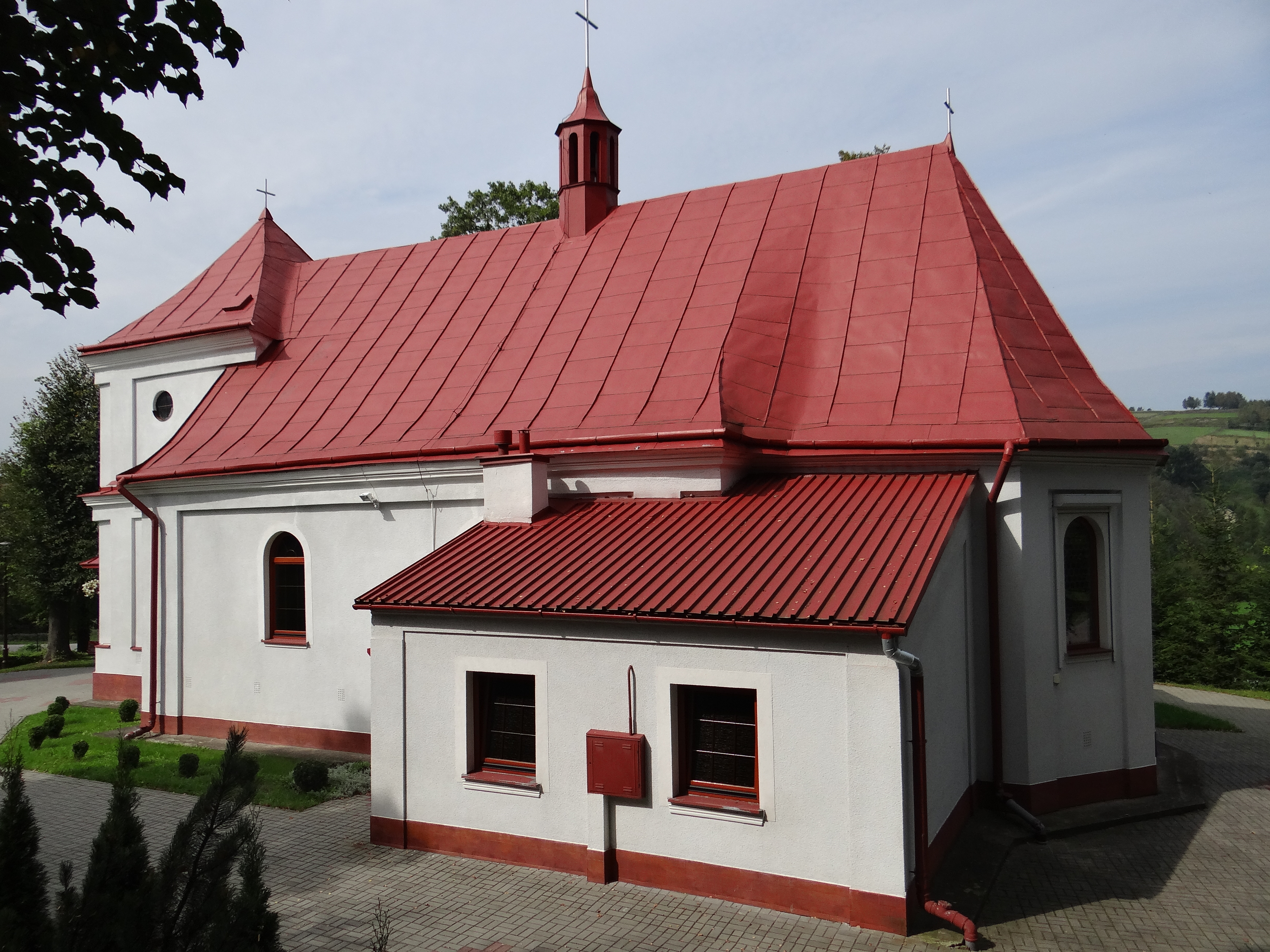 Hadle Szklarskie, cerkiew gr.-kat. p.w. Przemienienia Panskiego, ob. kościół rzym.-kat. par. p.w. Ni…, 1792, 1946